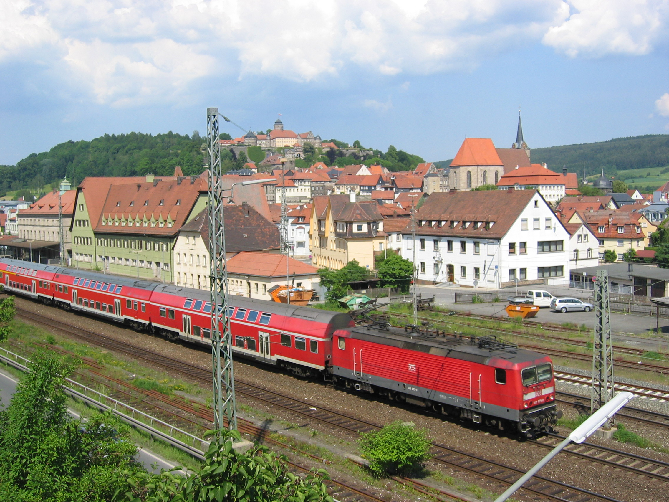 Kronach an der Bahnlinie München - Berlin